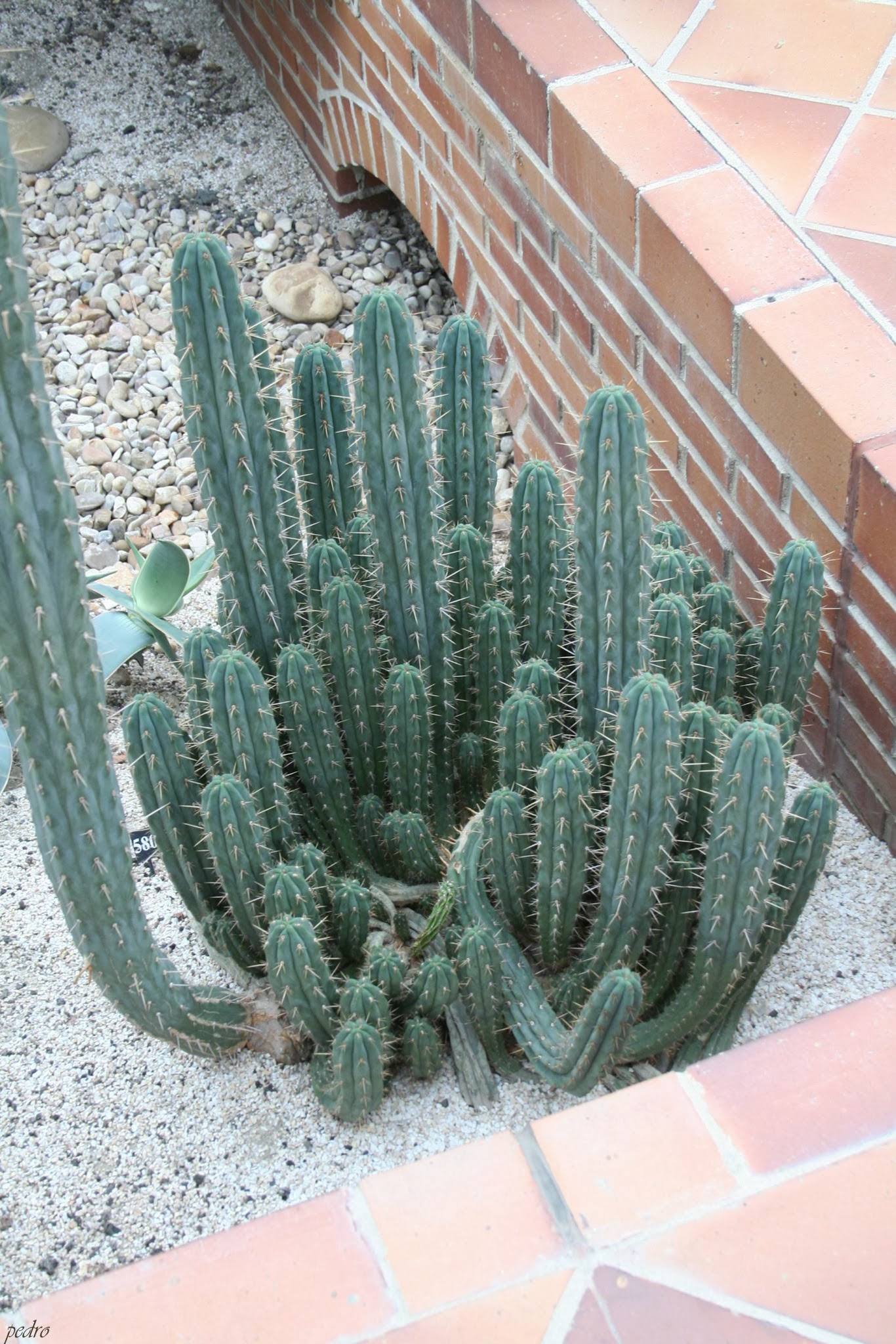 Trichocereus Pachanoi & Ecuador (2)